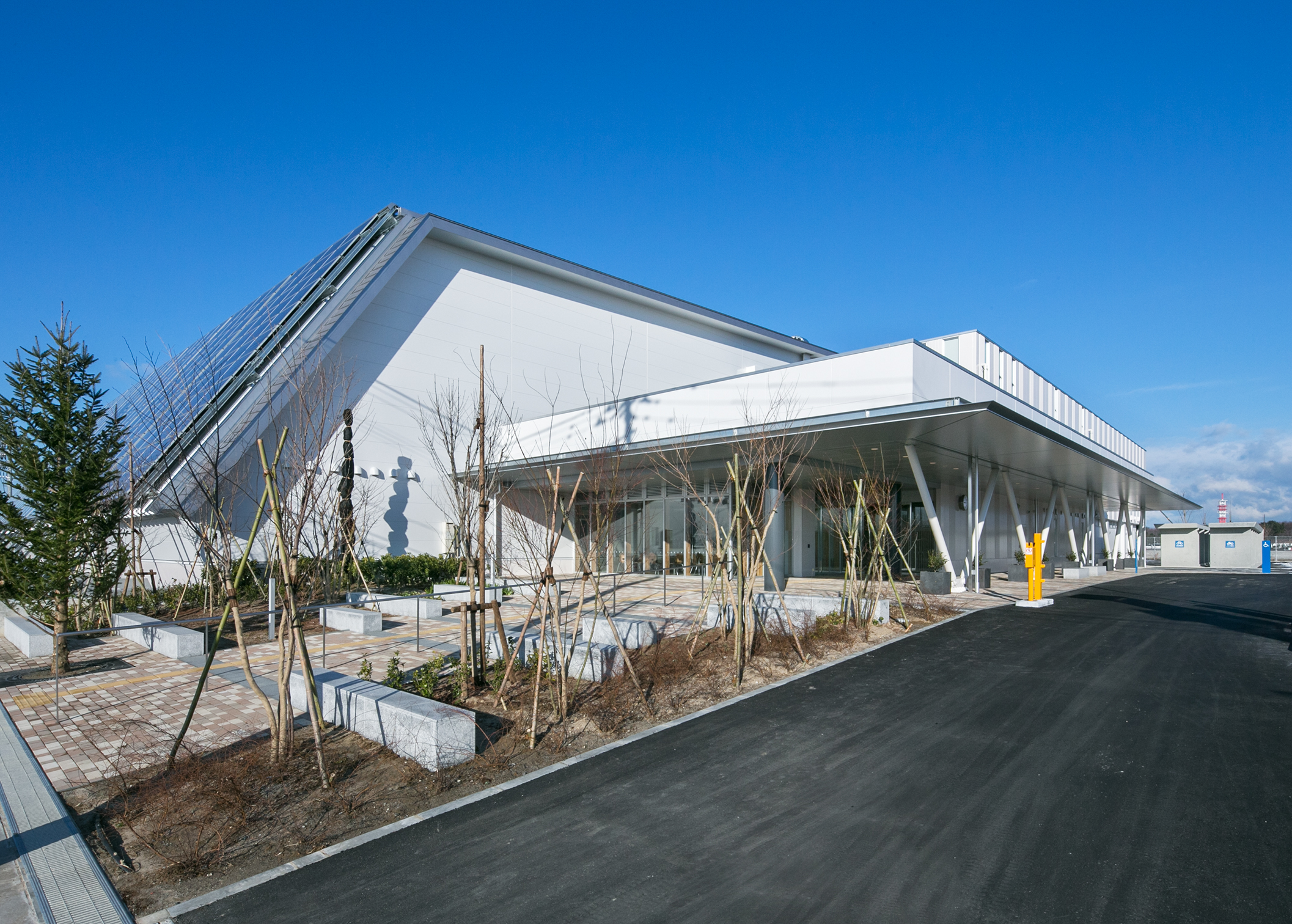 アイスアリーナ 新潟市中央区 2014年1撮影